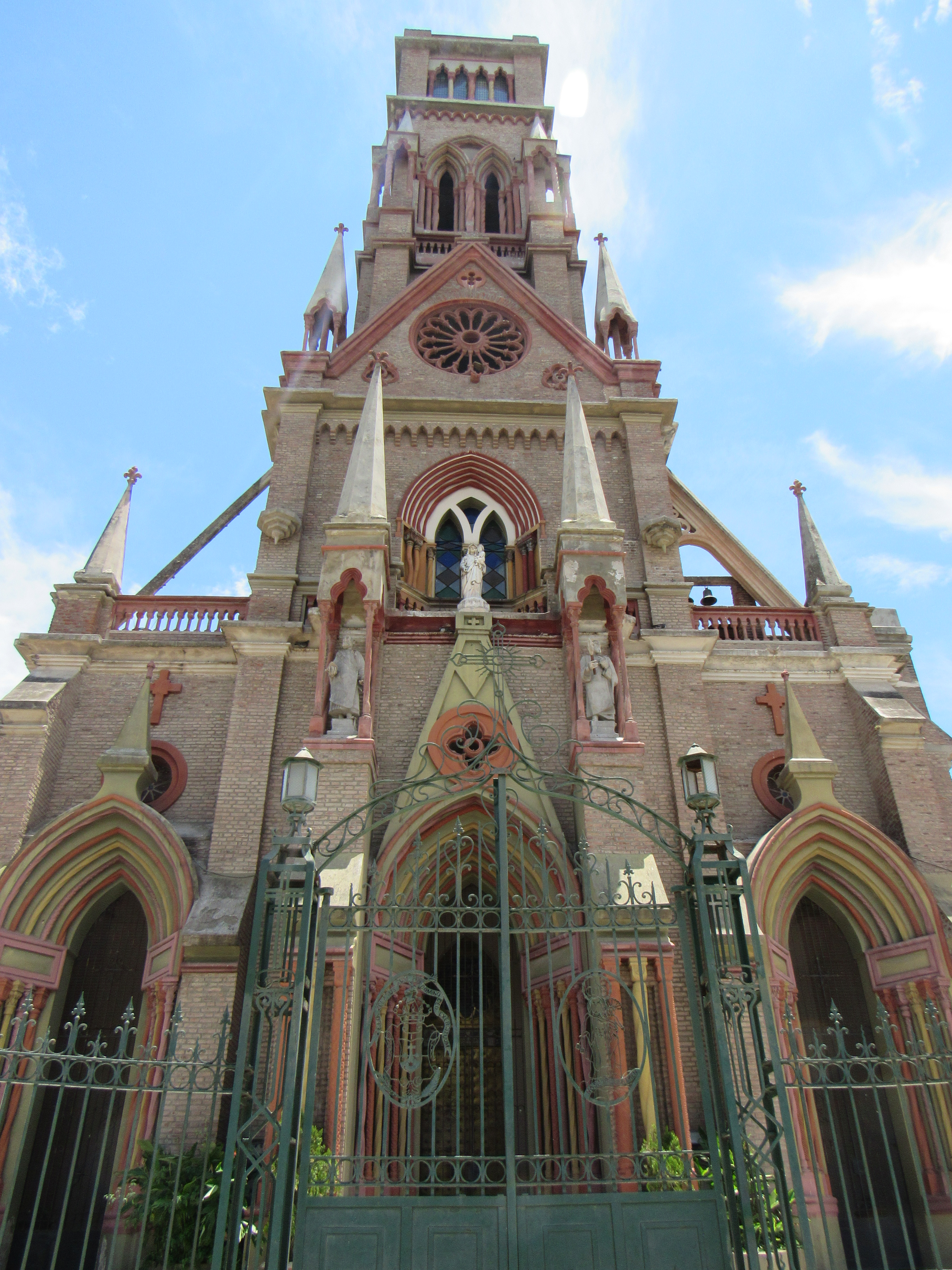 Iglesia Nuestra Señora del Carmen, Villa Allende, Córdoba, Argentina